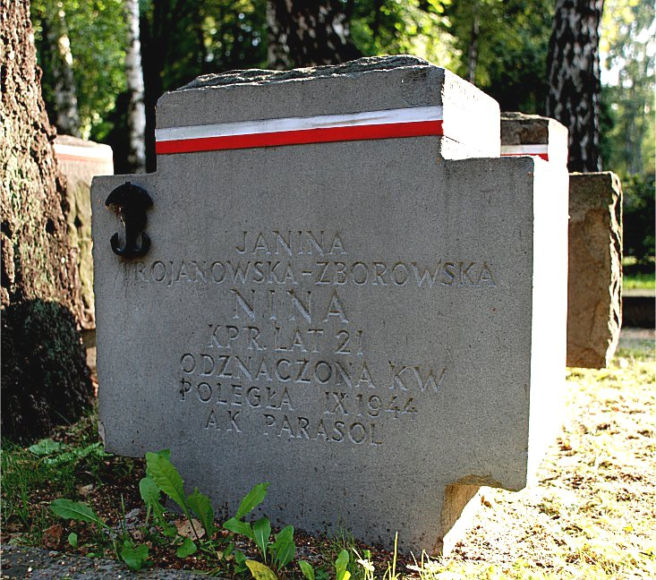 Powązki wojskowe